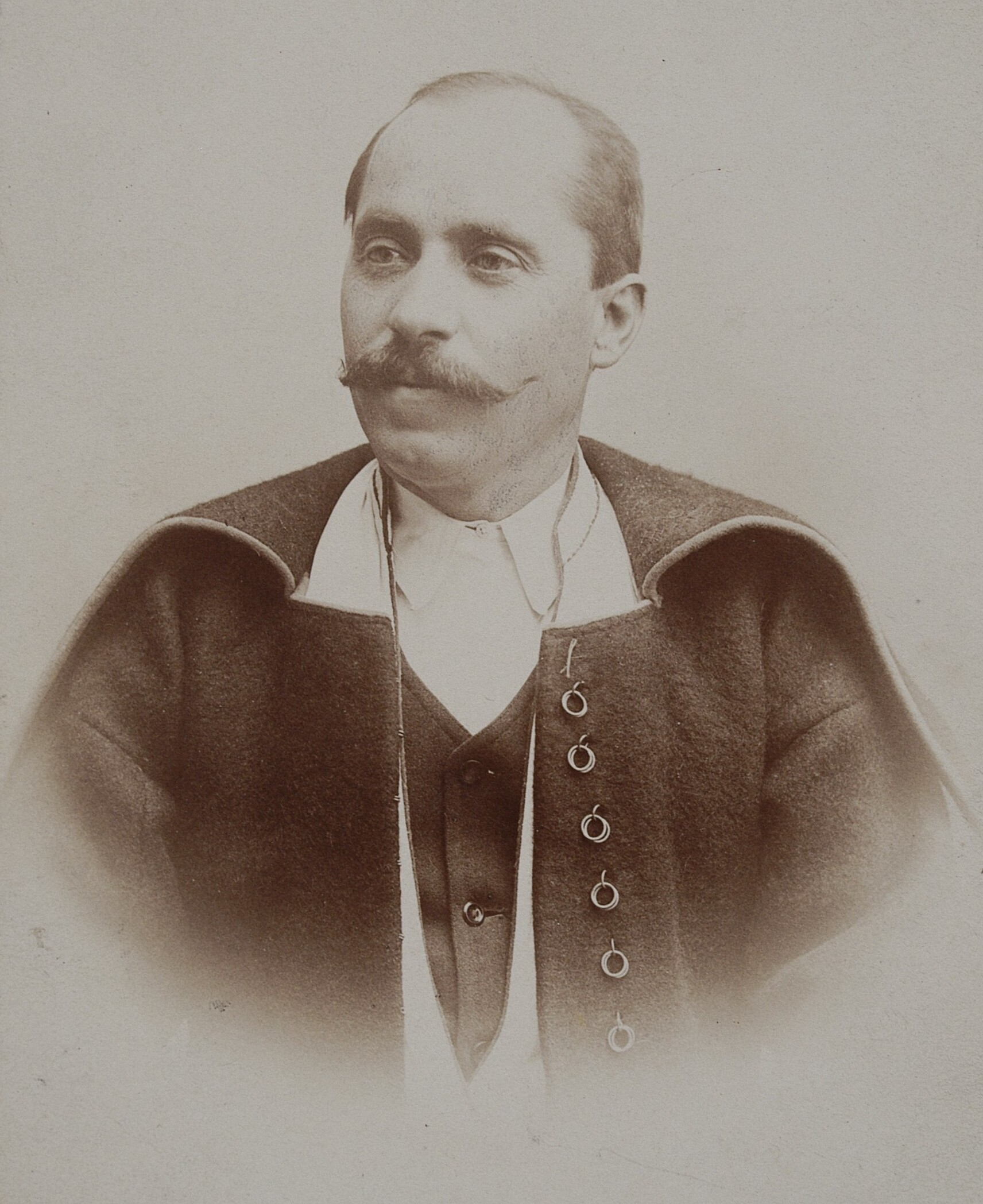 Jakub Bojko, ok. 1900 r.